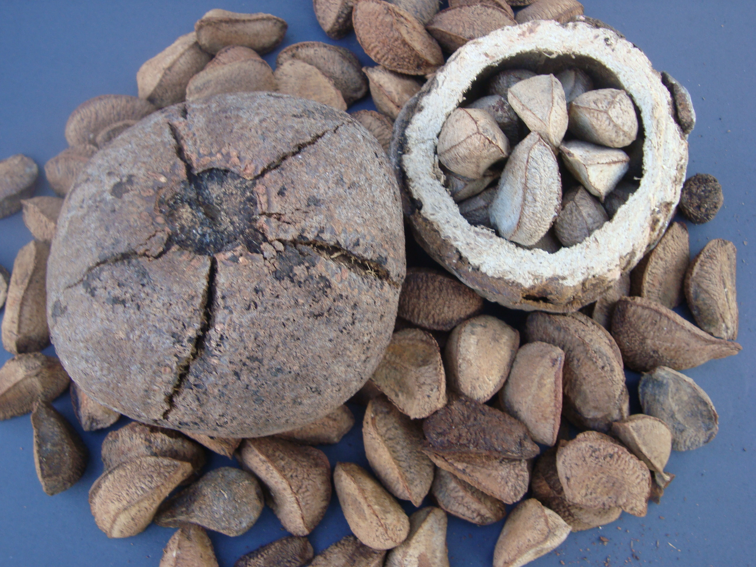 Castanha-do-Pará ou Bertholletia excelsa.